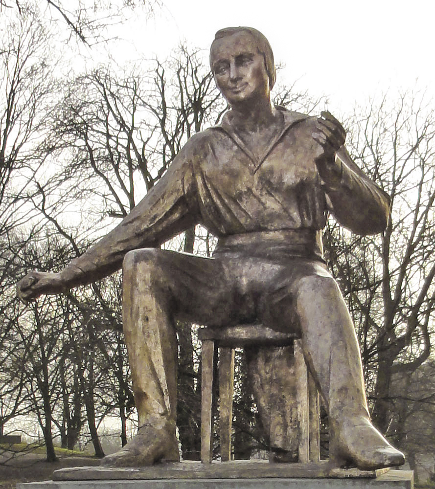 Heinrich-Heine-Denkmal. Standort: Bremen, Altenwall, neben der Kunsthalle